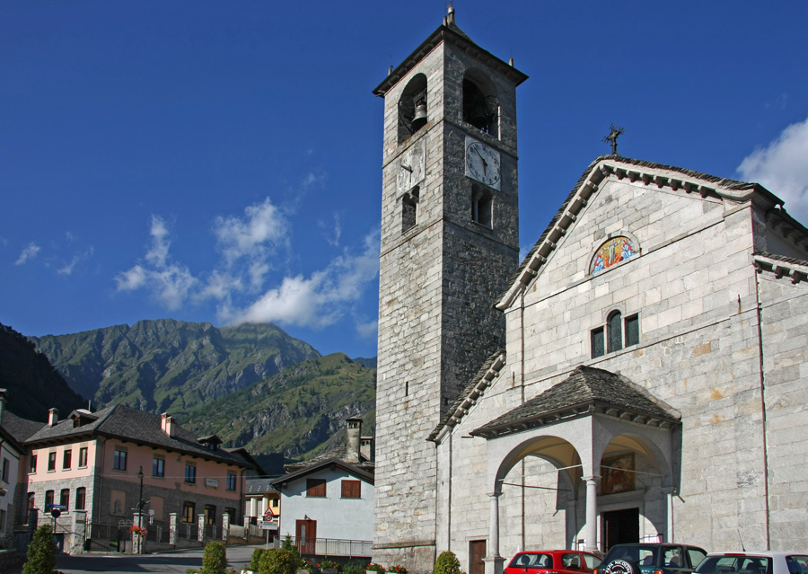 Veduta di Antronapiana, frazione di Antrona Schieranco (VB), con la parrocchiale di San Lorenzo ed il municipio